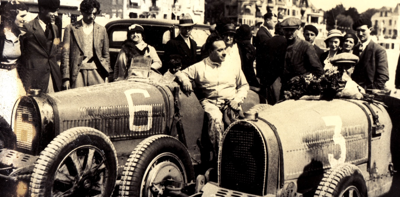 Jean Gaupillat, courreur automobile